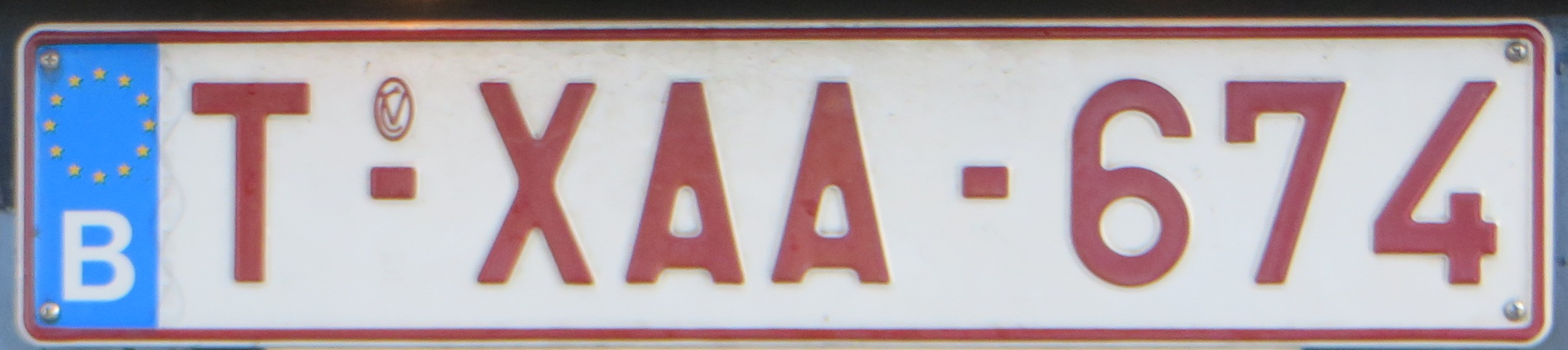 Taxi plaat België